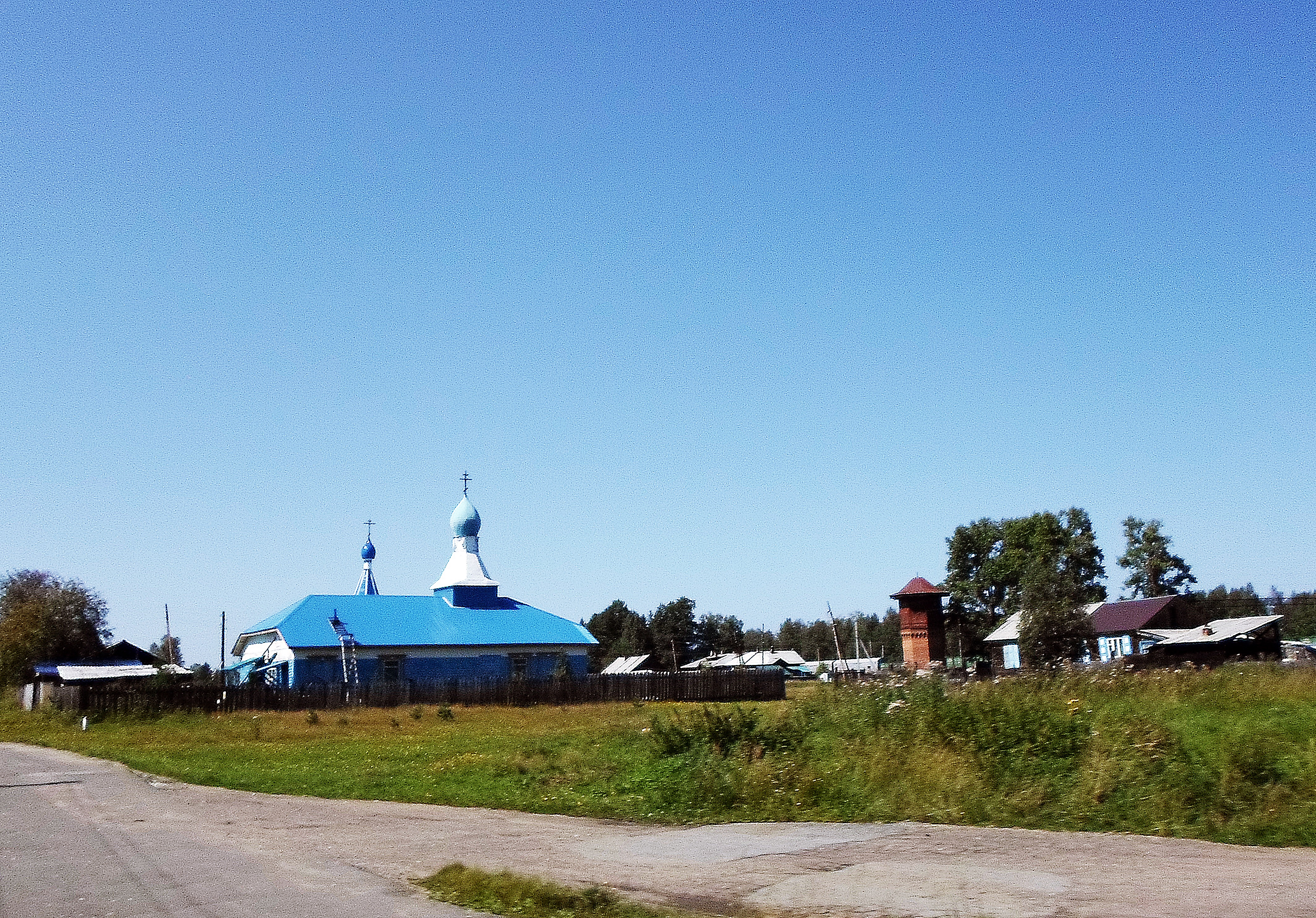 Покровская церковь в посёлке Выдрино. Кабанский район Бурятии.